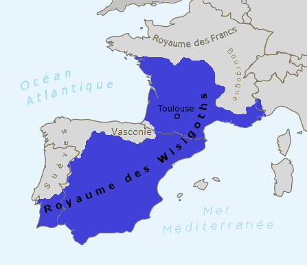 Refonte de Image:Royaume_des_Wisigoths.jpg